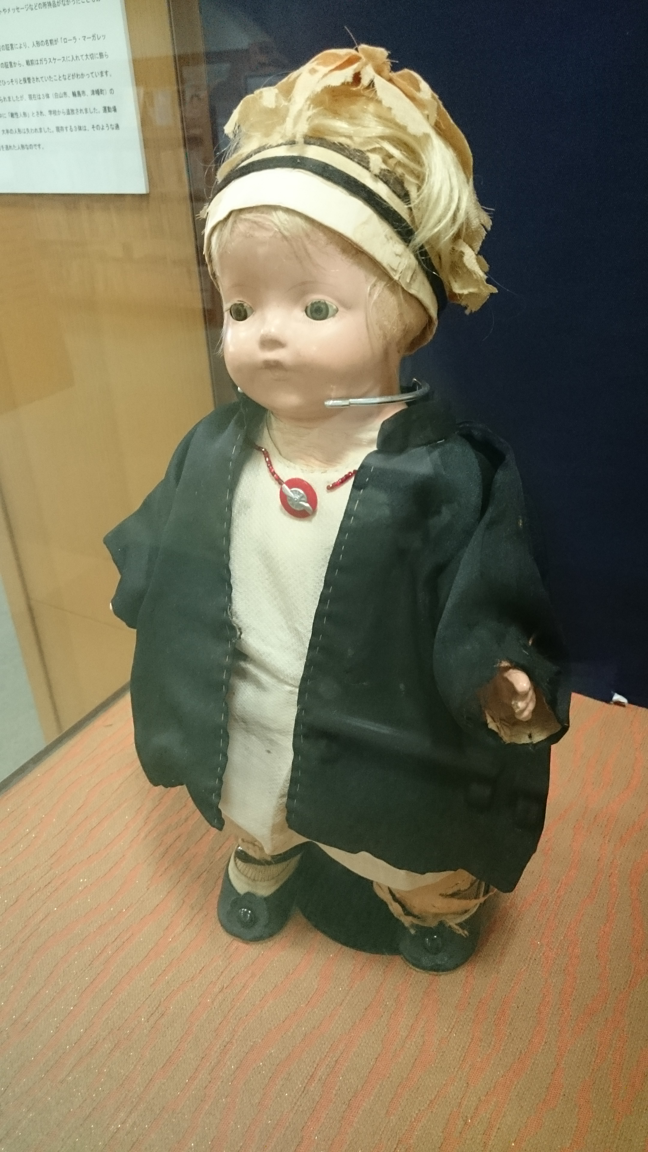 Blue-eyed dall, Laura Margaret. In 1927, children in the United States sent over 12, 000 dolls, to Japanese elementary school children as a gesture of friendship. This is one of the few, Named Laura Margaret, once had been displayed at a school with great care with her passport, which survived the WW2, recently was discovered 1987 in a warehouse of the school at Hakusan, Ishikawa (near Shirayama Hime Shrine). She was displayed at Tsurugi Library, Hakusan city, Ishikawa prefecture, Japan, during the summer 2015. 昭和2年（1927）、日米友好の証として全国各地の幼稚園や小学校に青い目の人形が贈られ大歓迎されました。その後、戦争がはじまり、多くの人形が敵国のものとして処分されましたが、石川県では3体残っているのが確認されています。そのうちの１体が、朝日小学校で発見された「ローラー・マーガレット」です。この青い目の人形は、昭和58年（1983）に『白山市立（旧鶴来町立）朝日小学校：戦後の昭和41年（1966）に一ノ宮小学校と鶴来小学校とが統合され新校舎に引っ越した後』で校内大掃除が行われた際、物置に保存されていた状態で発見されました。パスポートやメッセージなどの所持品はありませんでしたが、人形が贈られた当時小学生だった方により、人形の名前が「ローラ・マーガレット」であることがわかりました。他にも当時を知る方々の証言から、戦前はガラスケースに入れられて大切に飾られていたことや、戦中・戦後は人目を忍ぶように物置でひっそりと保管されていたことなどがわかっています。 青い目の人形は、石川県には全部で２０５体が贈られましたが、現在は３体（白山市、輪島市、津幡町）現存しています。他の人形たちは戦時中に「敵性人形」とされて学校から追放され、運動場で焼却され、木刀で破壊され、ほとんどの人形が失われています。石川県内に現存する３体は優しい人々にまもられそのような過酷な時代の難を逃れた人形です。